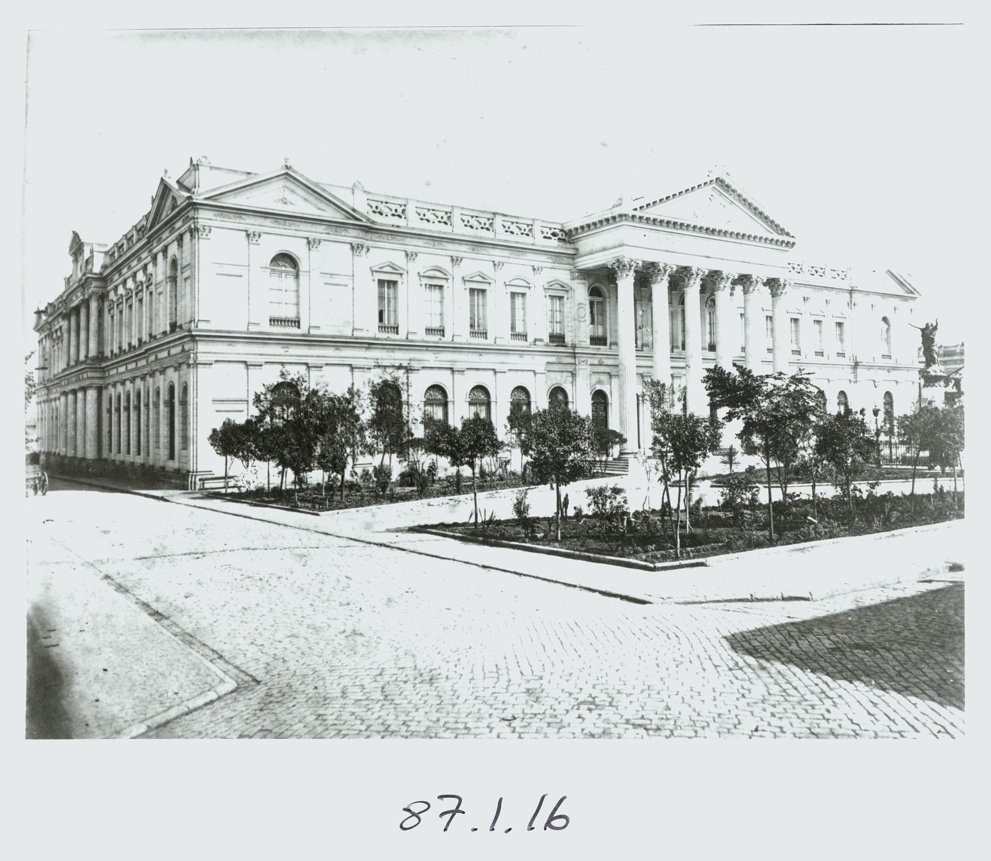 Vista de los jardines del Congreso Nacional desde la intersección de las calles Compañía de Jesús y Bandera, Santiago de Chile.